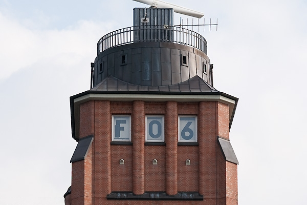 Im Turm der Lotsenstation Seemannshöft befindet sich eine Pegelanzeige, die den Wasserstand der Elbe anzeigt. „F“ steht für Flut (auflaufendes Wasser), „E“ für Ebbe (ablaufendes Wasser). Angezeigt wird der Wasserstand über Seekartennull (SKN) in Dezimetern in schwarzen Zahlen, unter SKN in roten Zahlen. Das Seekartennull im Hamburger Hafen beträgt Normalnull (NN)-1,90 m. Auf dem Foto ist bei auflaufendem Wasser (F) ein Wasserstand von 0,60 m über SKN bzw. 1,30 m über NN dargestellt.